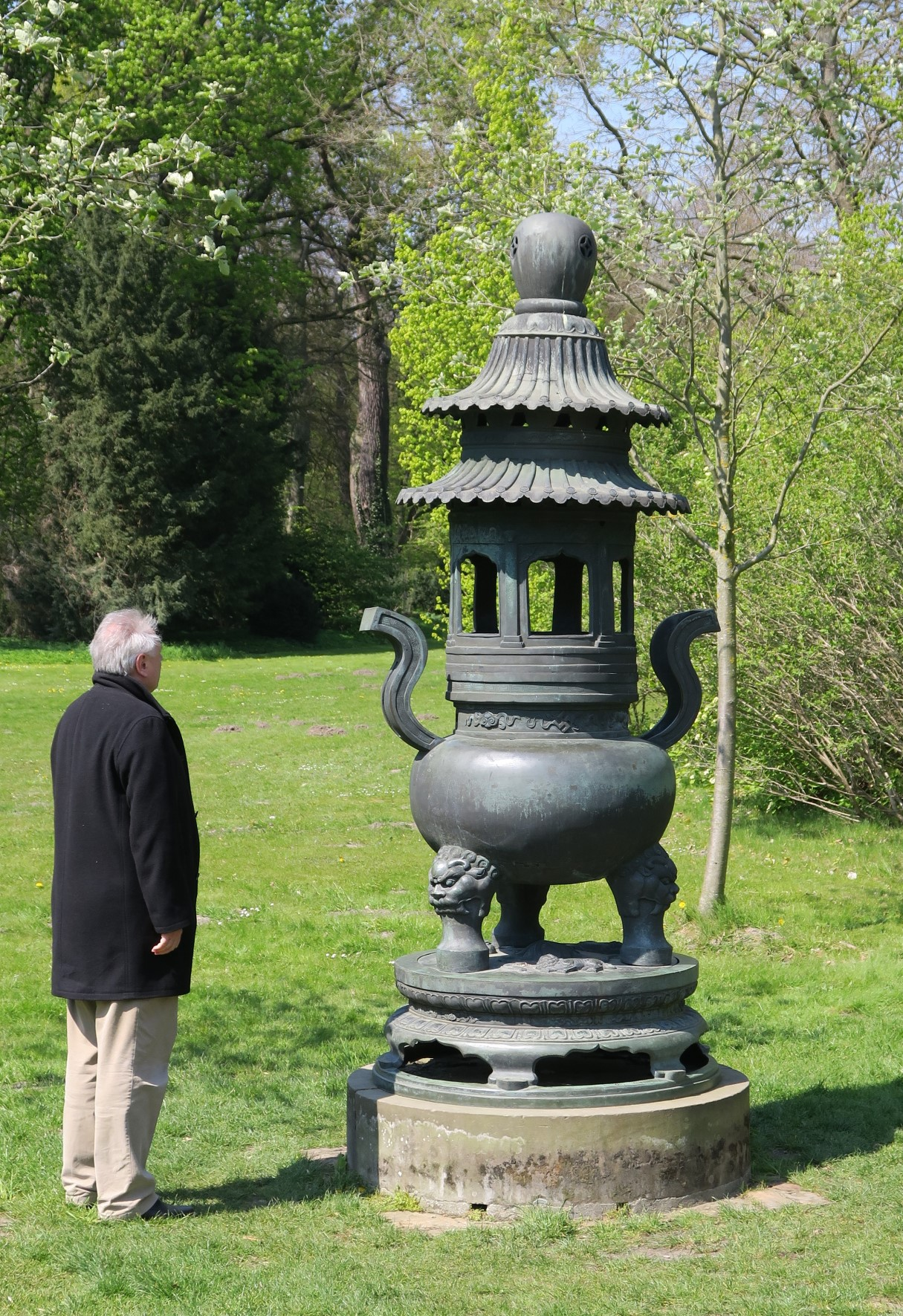 Räuchergefäß Sanssouci